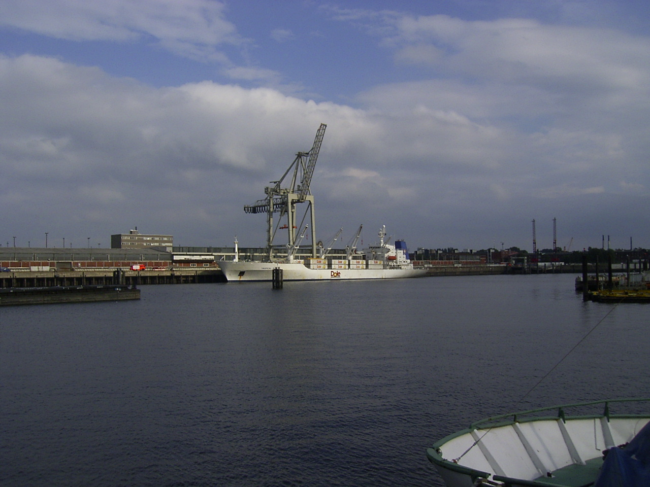 Bananenfrachter "Tropical Mist" der Firma Dole am O'Swaldkai in Kleiner Grasbrook